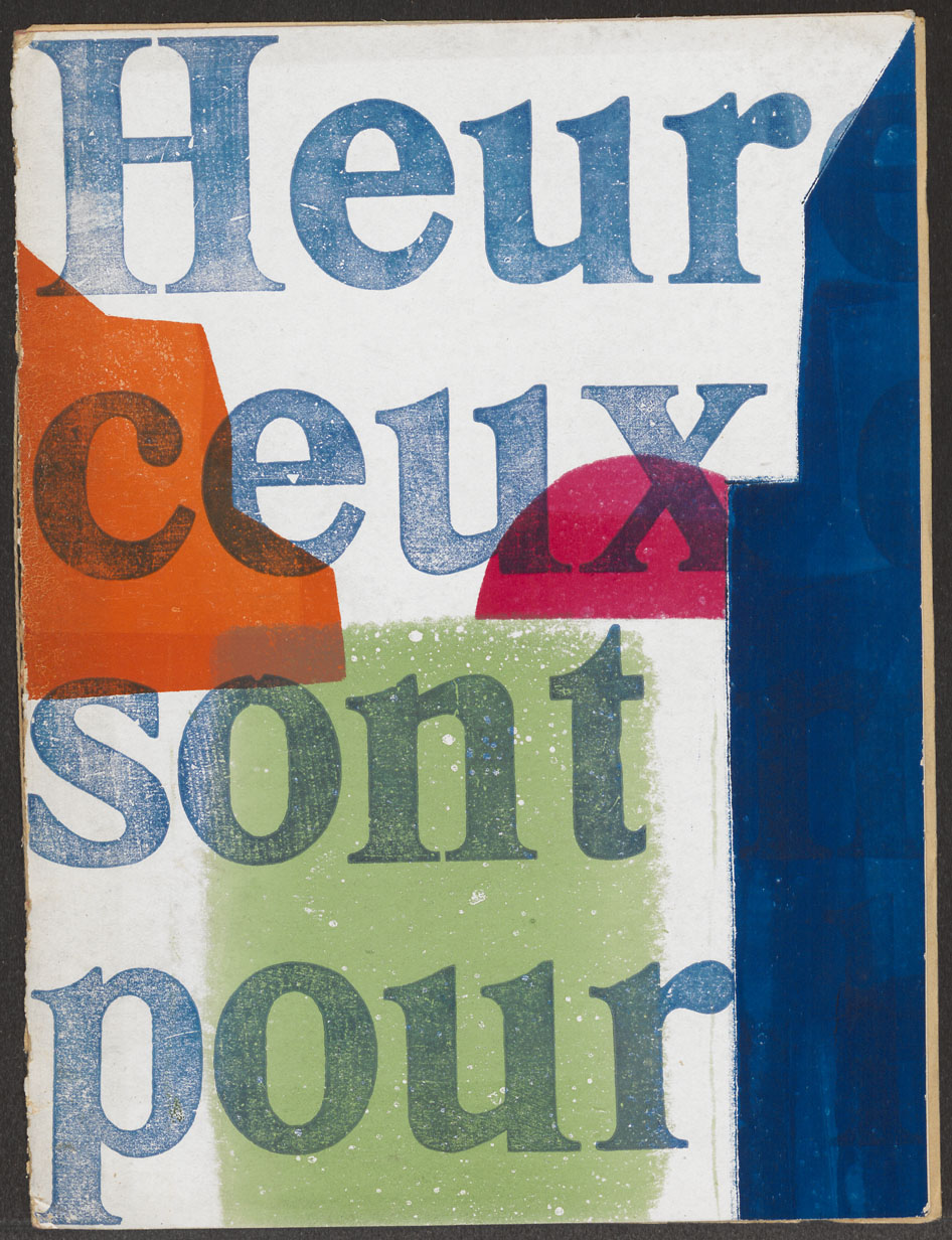 Heureux ceux qui sont morts. Prière pour nous autres charnels - Charles Peguy. Ontwerp H.N. Werkman. Colofon: "... gedrukt in opdracht van De Blauwe Schuit door H.N. Werkman, in een opl. van 90 ex., die niet in den handel komen en uitsluitend bestemd zijn voor de vrienden van De Blauwe Schuit"